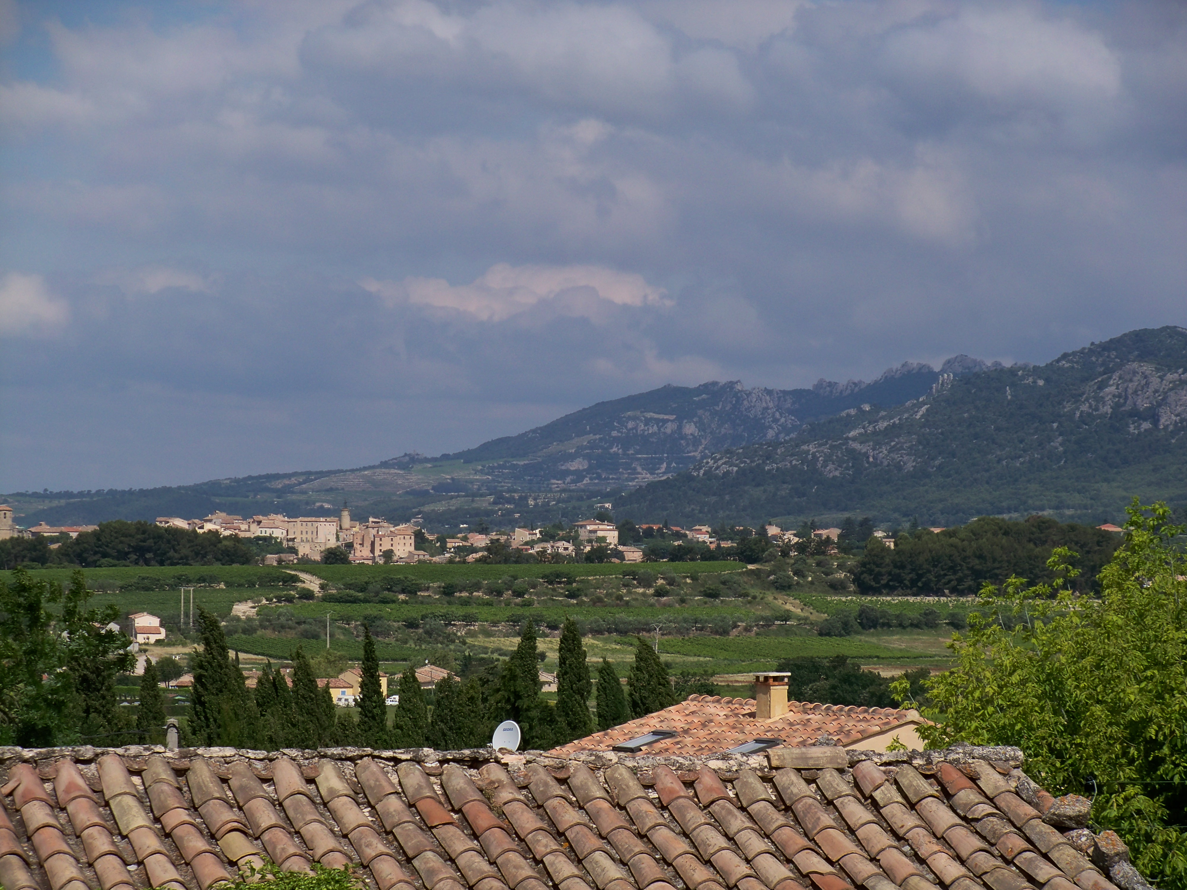 Les Dentelles de Montmirail, vues de la place de la mairie de Saint Pierre de Vassols, Vaucluse (Village de Caromb au pied des Dentelles)